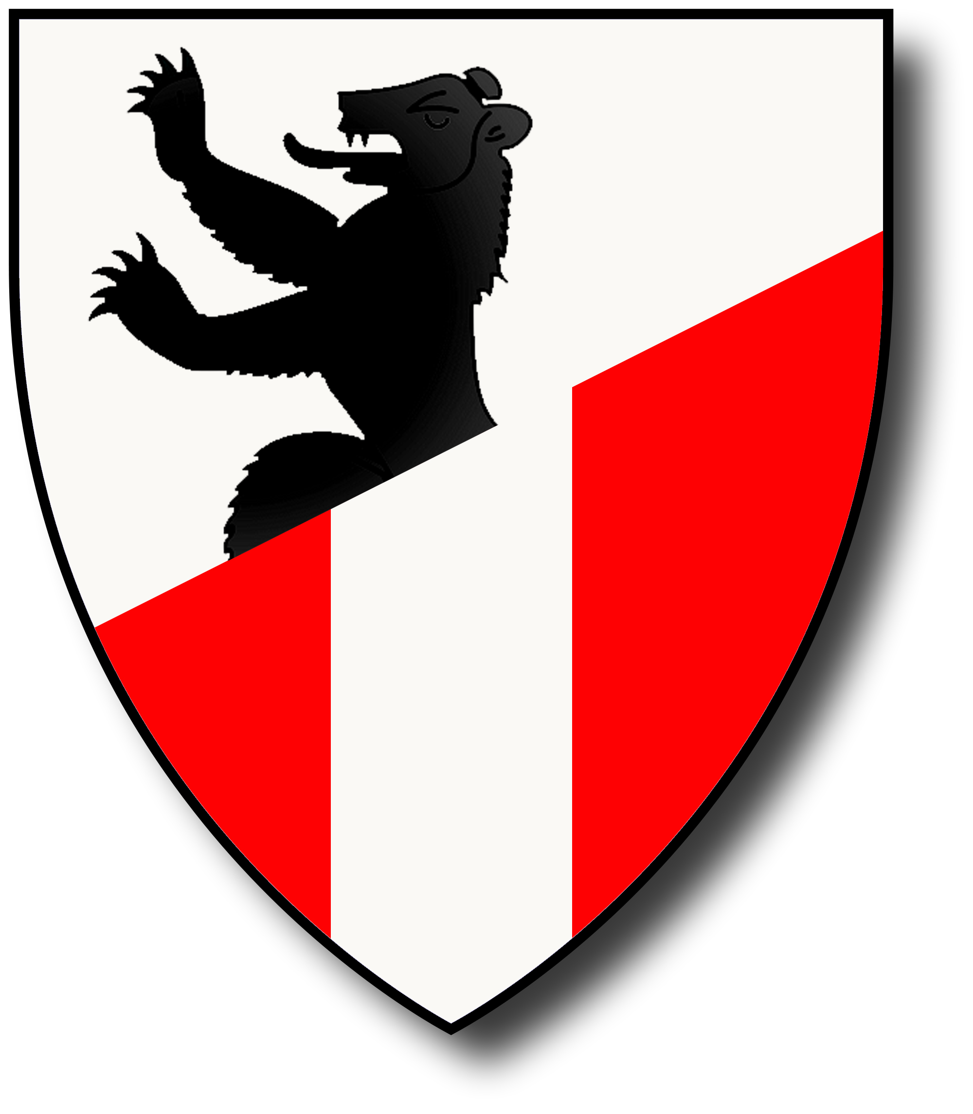 Eckartsau wappen